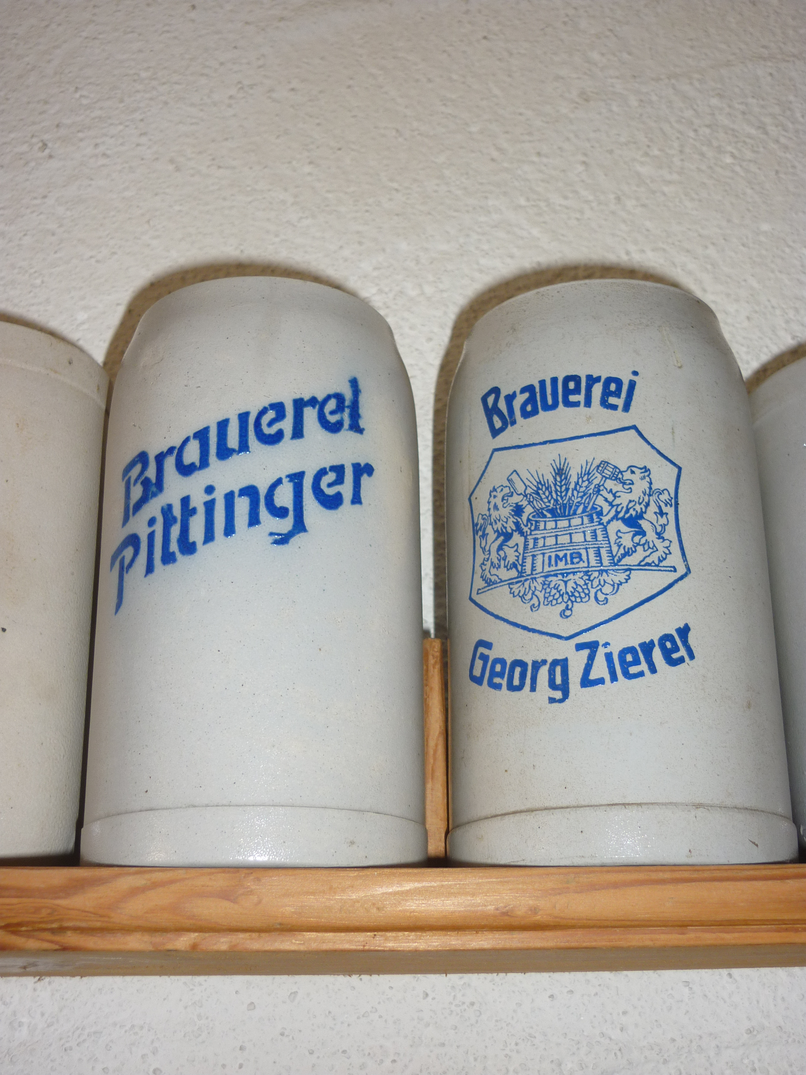 Maßkrüge Brauerei Pittinger und Zierer Wörth Donau